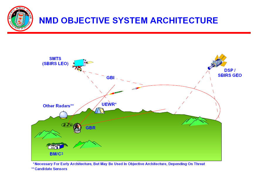 Die Zielsetzung bei der Systemarchitektur der National Missile Defense Einige Abkürzungen: GBR = Ground-Based Radar = Am Boden stationiertes Radar GBI = Ground-Based Interceptor = Am Boden stationierte Abfangeinrichtung (vgl. [1]) DSP = Defense Support Program = Programm zur Unterstützung der Verteidigung SBIRS = Space-Based Infrared System = Weltraumgestütztes Infrarotsystem UEWR = Upgraded Early Warning Radar = Verbessertes Frühwarnradar SMTS = Space and Missile Tracking System = Raumüberwachungs- und Raketenverfolgungssystem LEO = Überwachungssatellit im erdnahen Raum ("Lower Earth Orbit") GEO = Geostationärer Überwachungssatellit